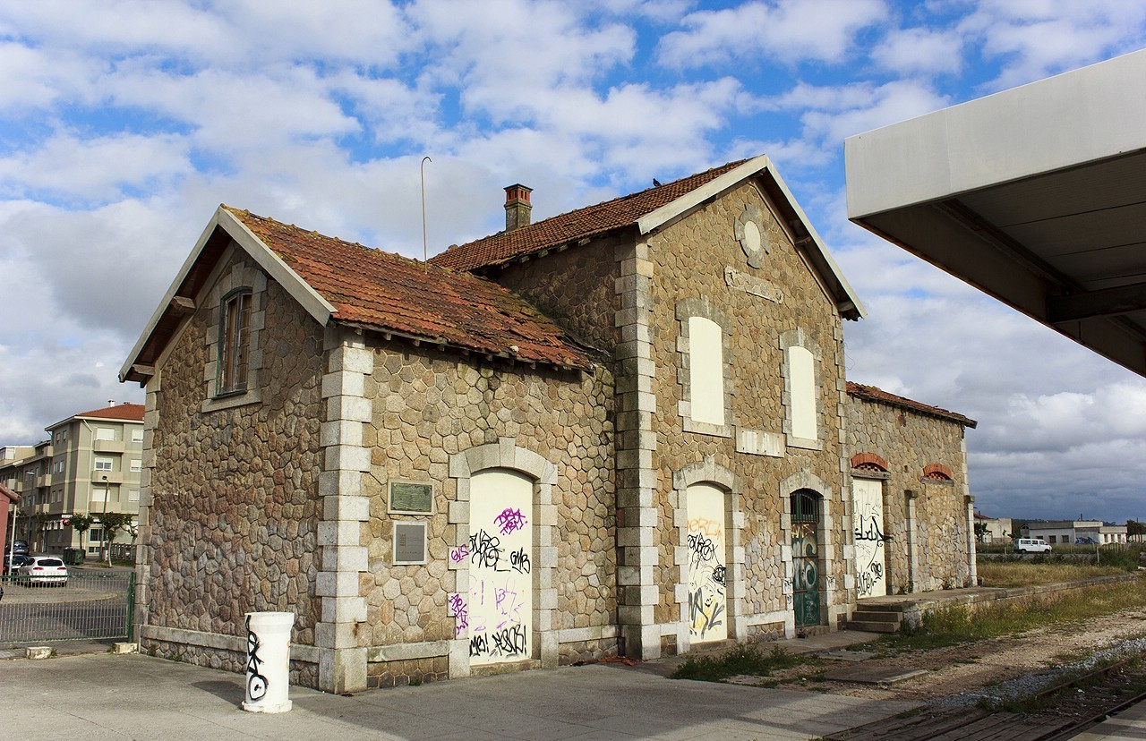 Terminal emparedado da Linha do Vouga em Espinho